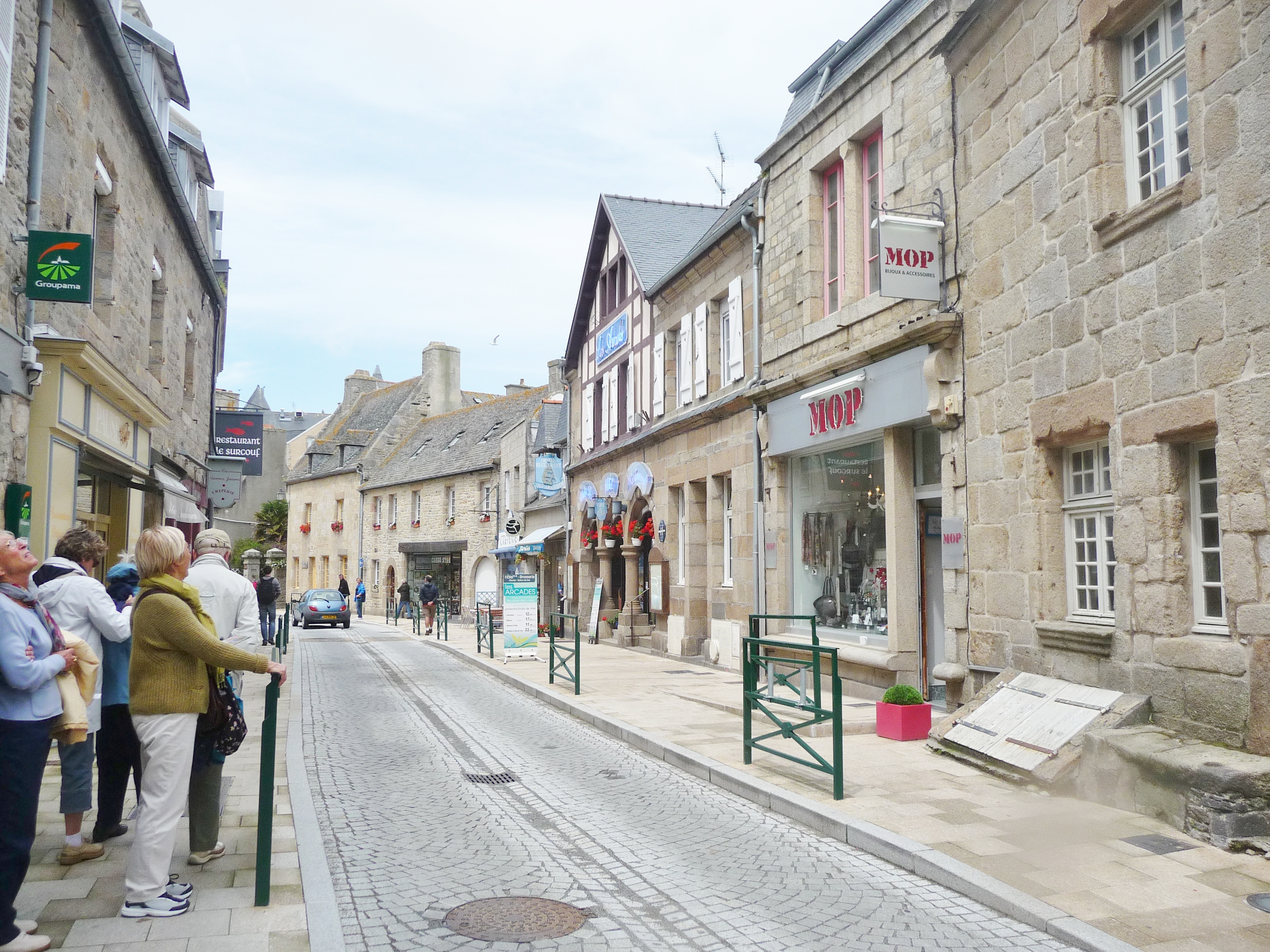 Roscoff : rue commerçante principale